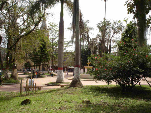 El Parque Simon Bolivar o parque principal esta ubicado frente a la Basílica Menor "Nuestra Señora del Rosario" a demas despues de una remodelacion que tuvo lugar en el año 2005 hoy en dia tiene una belleza mitologica, que hace recordar los paisajes de "sueño de una noche de verano" la cual solo se puede vivir si visitas esta tierra tan hermosa y agradable la cual siempre tendra los brazos abiertos para sus turistas